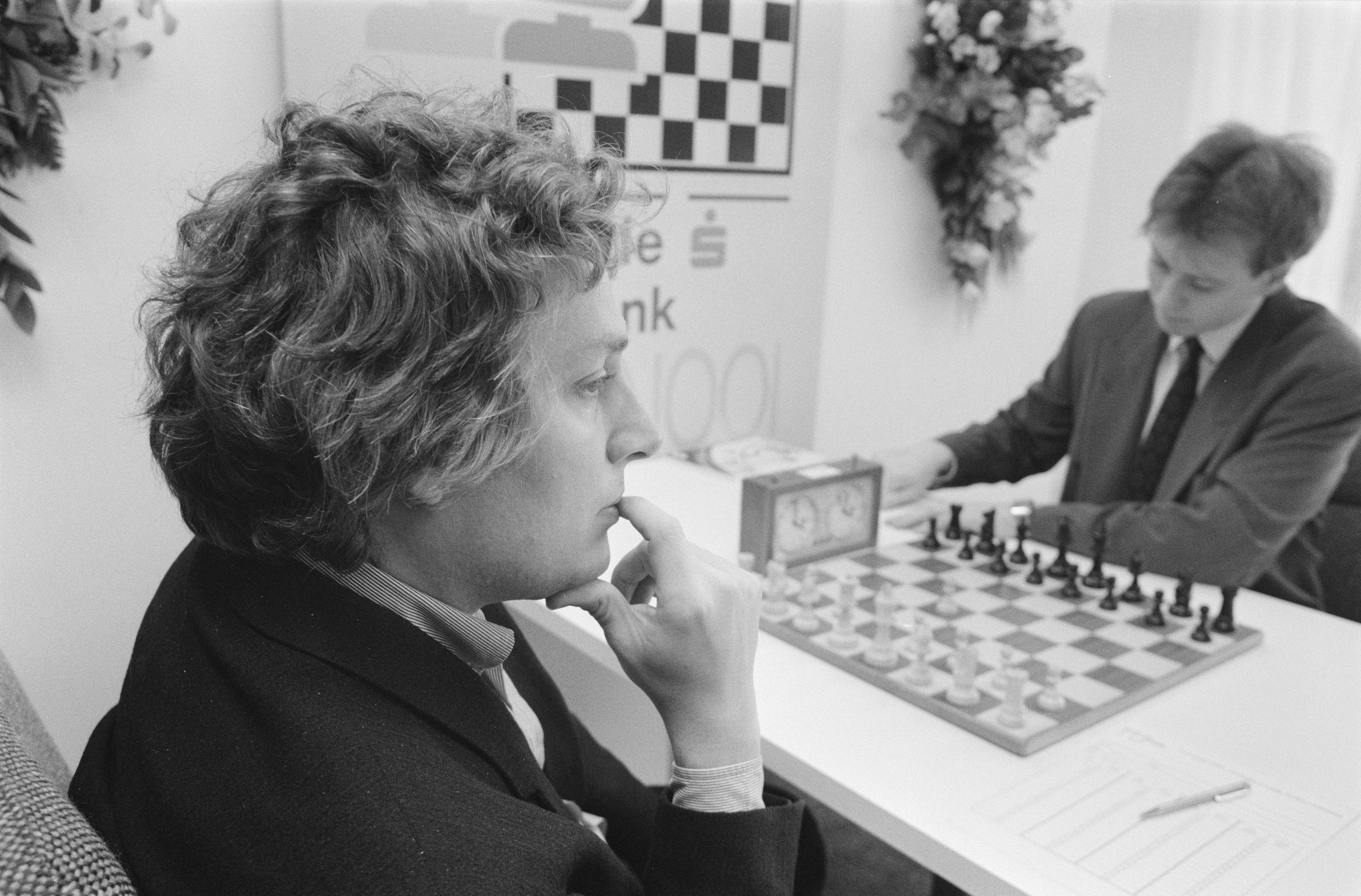 Collectie / Archief : Fotocollectie Anefo Reportage / Serie : Schaakvierkamp te Amsterdam Beschrijving : Jan Timman (l) tegen J. Hjartarson Datum : 21 maart 1989 Locatie : Amsterdam, Noord-Holland Trefwoorden : schaken, schakers, vierkampen Persoonsnaam : Hjartarson, J., Timman, Jan Fotograaf : Croes, Rob C. / Anefo Auteursrechthebbende : Nationaal Archief Materiaalsoort : Negatief (zwart/wit) Nummer archiefinventaris : bekijk toegang 2.24.01.05 Bestanddeelnummer : 934-4265